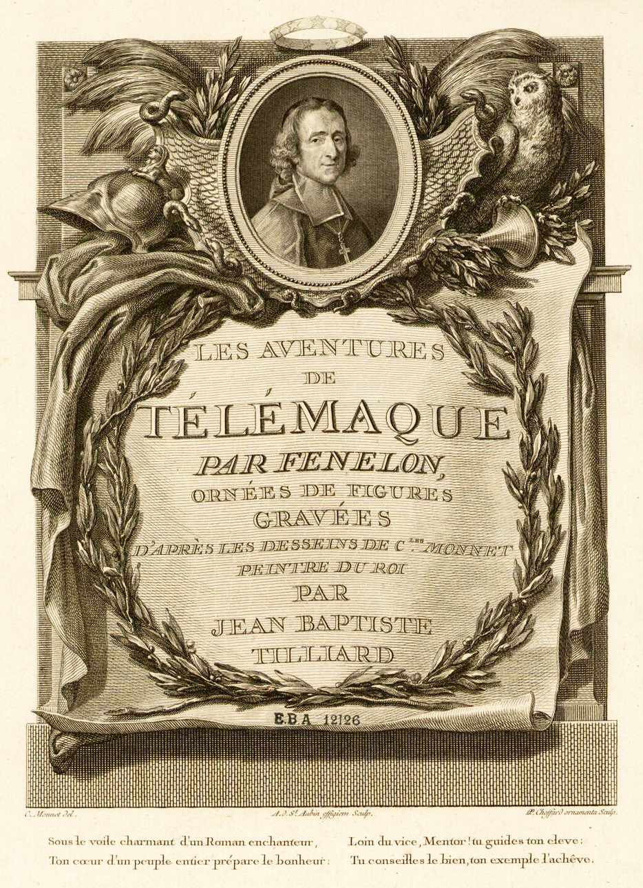 Les Aventures de Télémaque par Fenelon ornées de figures gravées d'après les desseins de C. Monnet, peintre du roi, par Jean Baptiste Tilliard : (portrait)